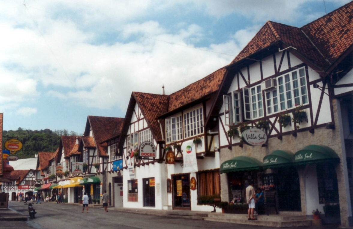 Santa Catarina, Brasil